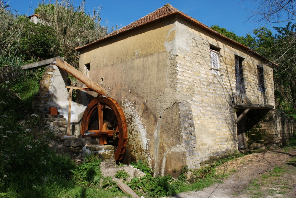 Azenha da Ti Luísa localizada no lugar do Boco, freguesia de Soza, concelho de Vagos.